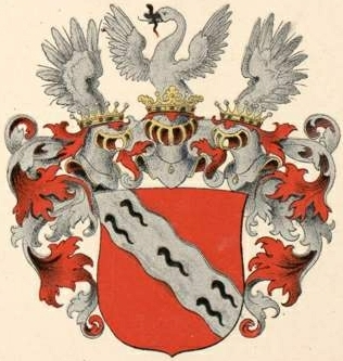 Igelströmi suguvõsa vabahärravapp